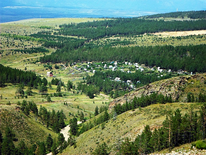 Юго-запад хребта Моностой. Дачный посёлок СК "Шахтёр" близ Гусиноозёрска.